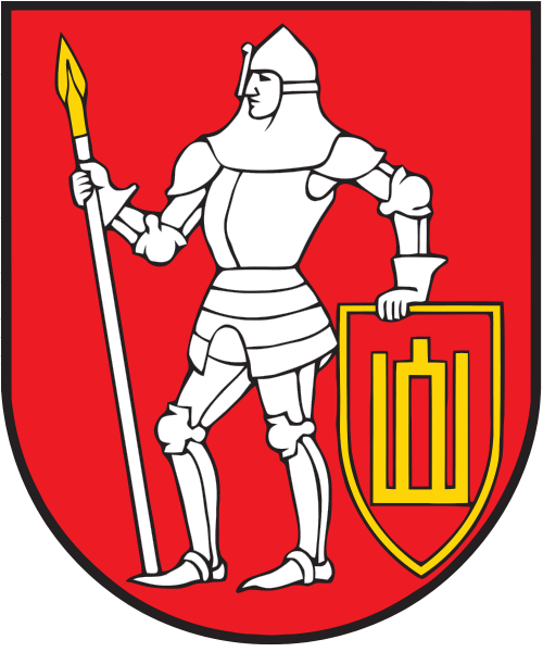 Kategorija:Lietuvos savivaldybių herbai